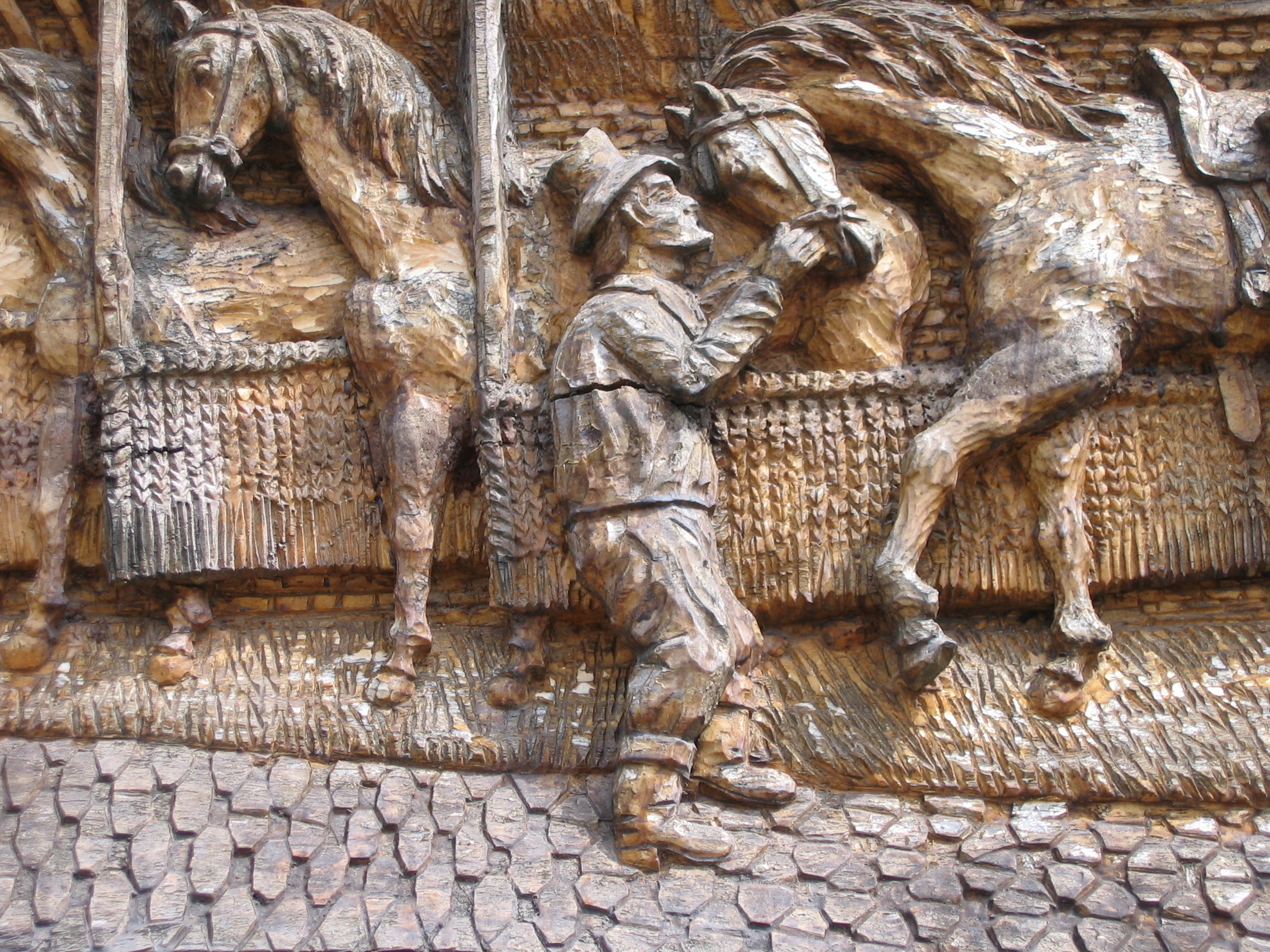 Détail Gravure sur Bois Relais de Poste à chevaux de Launois Ardennes France